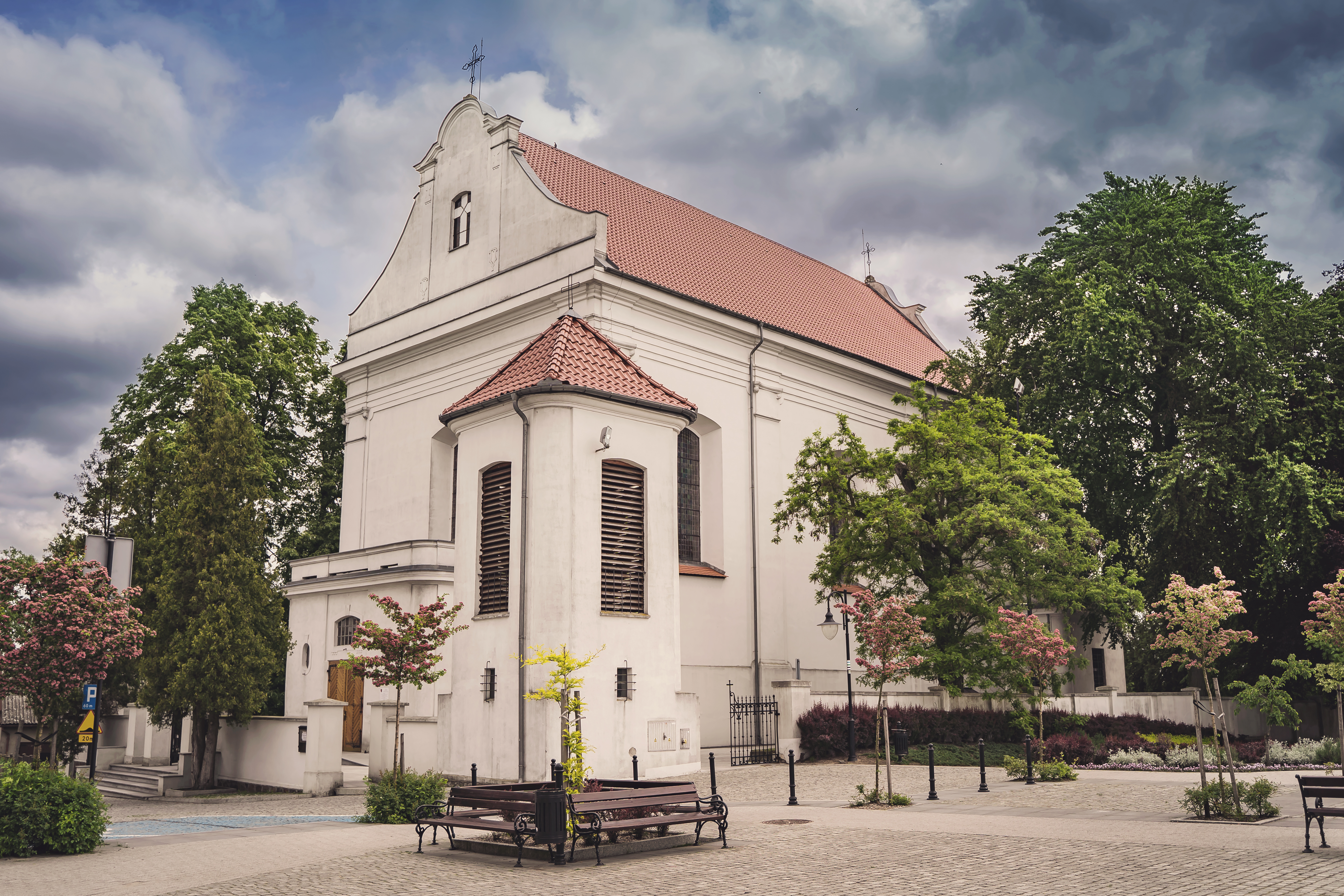 Więcbork, Kościół Wniebowzięcia Najświętszej Maryi Panny i św. Apostołów Szymona i Judy Tadeusza w Więcborku